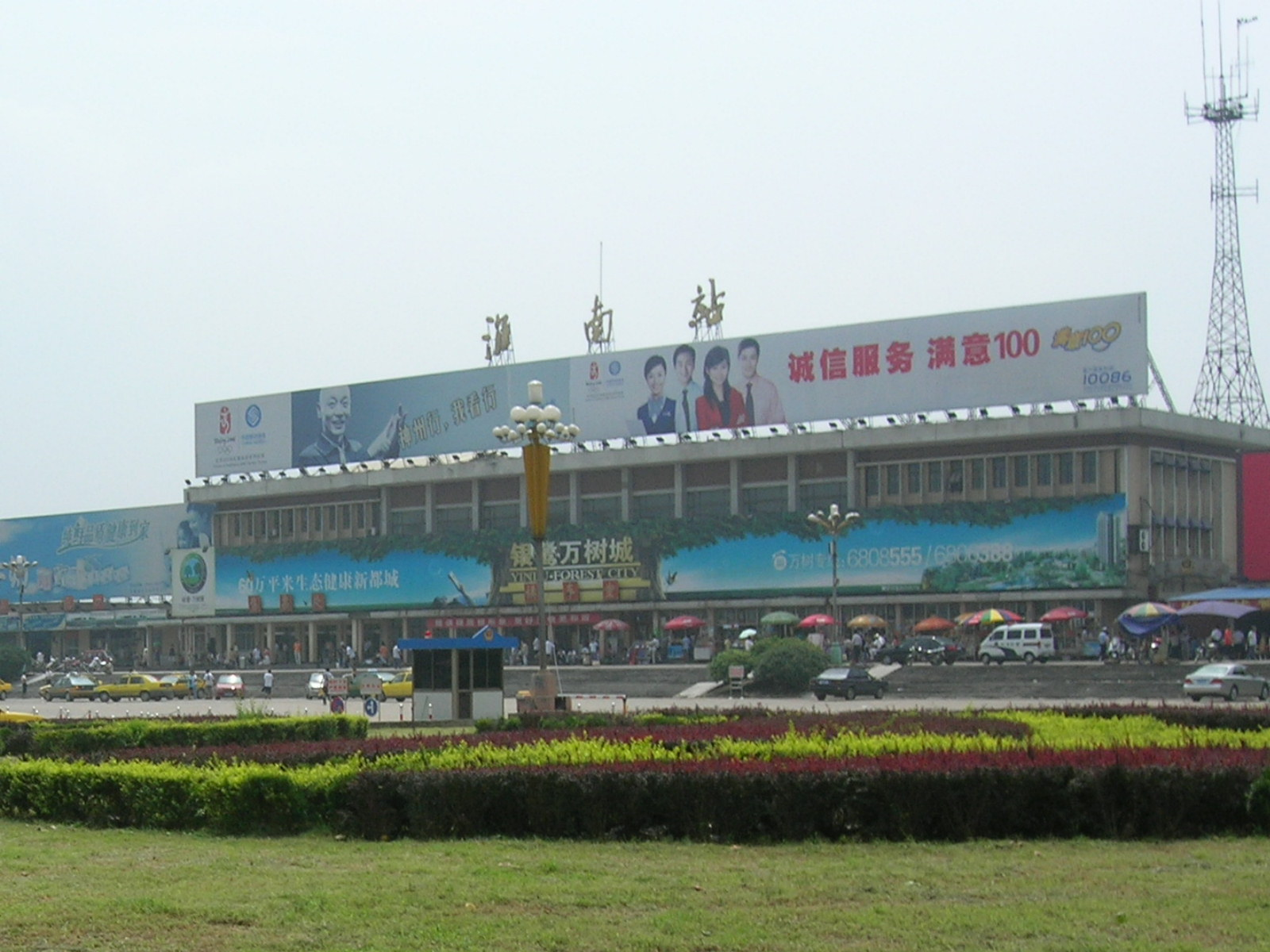 安徽省淮南市淮南火车站